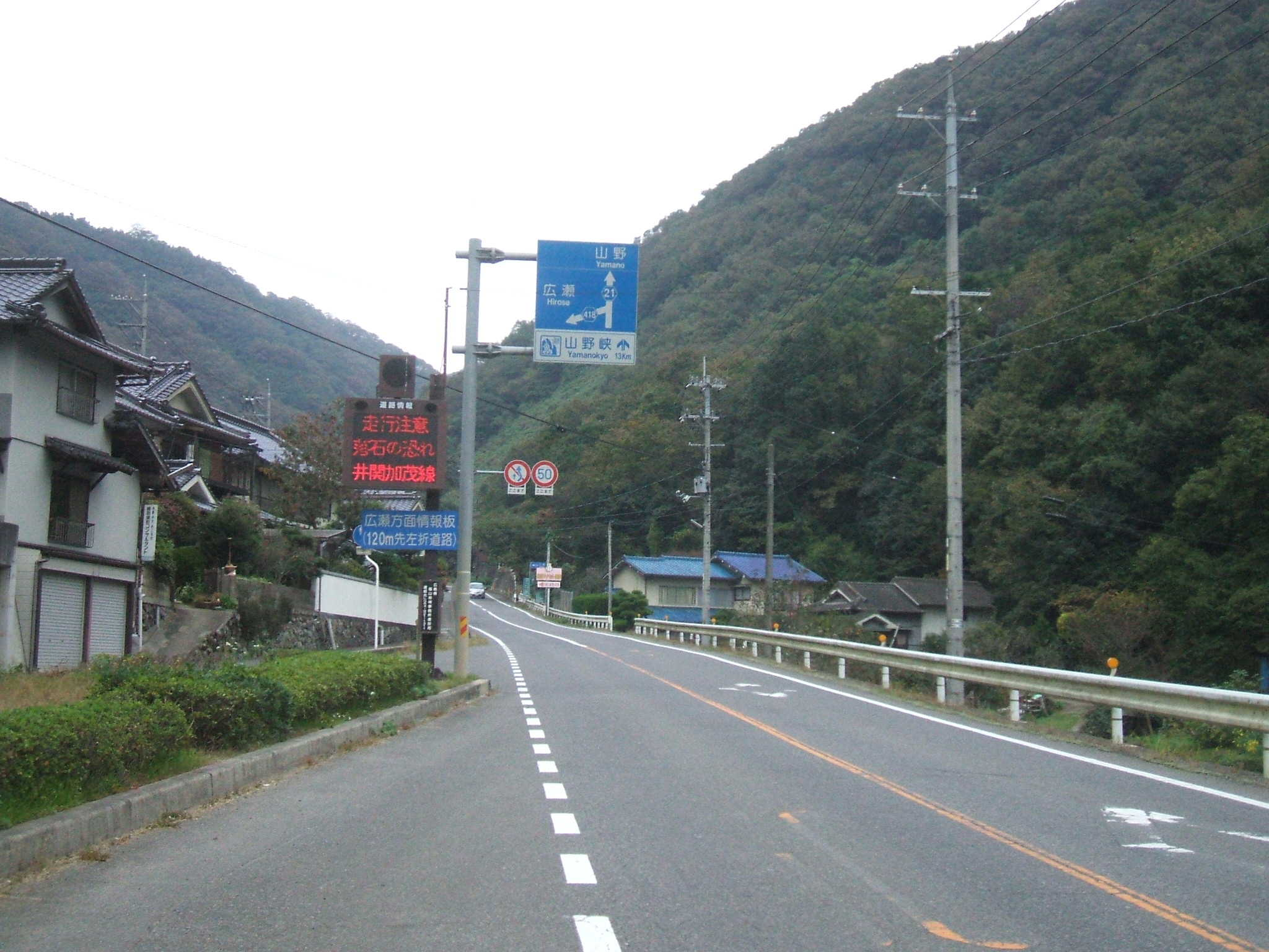 広島県福山市山野町にある県道21号と県道418号の分岐点